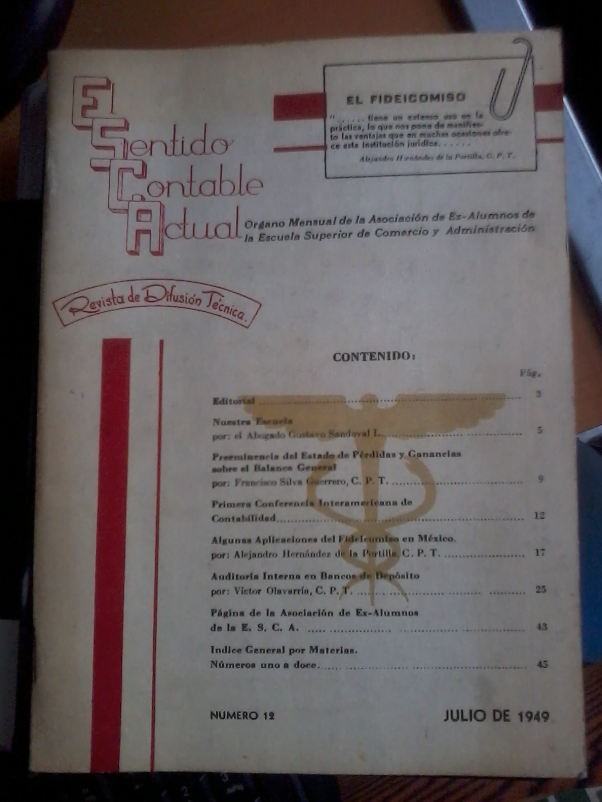 Revista ESCA (órgano mensual de la Asociación de Ex Alumnos de la Escuela Superior de Comercio y Administración), julio 1949 (núm. 12).